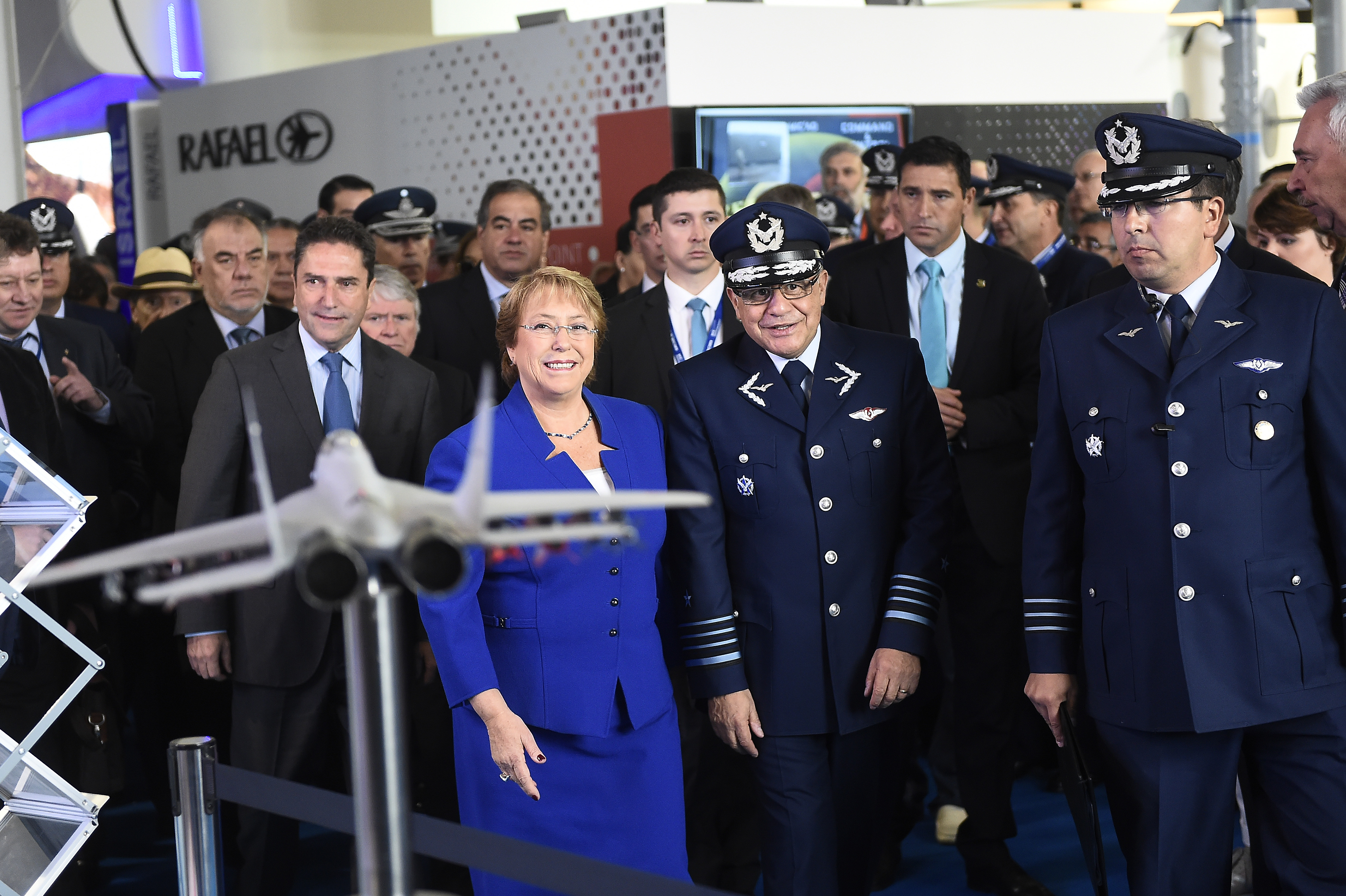 Gobierno de Chile